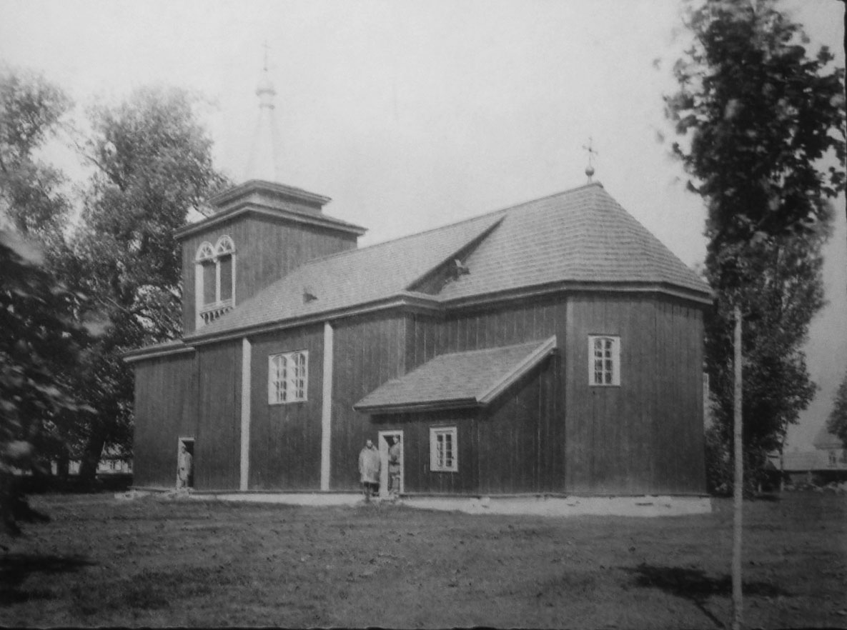 Беларуская (тарашкевіца): Скідзель (Skidziel), пляц Рынак (plac Rynak). Царква